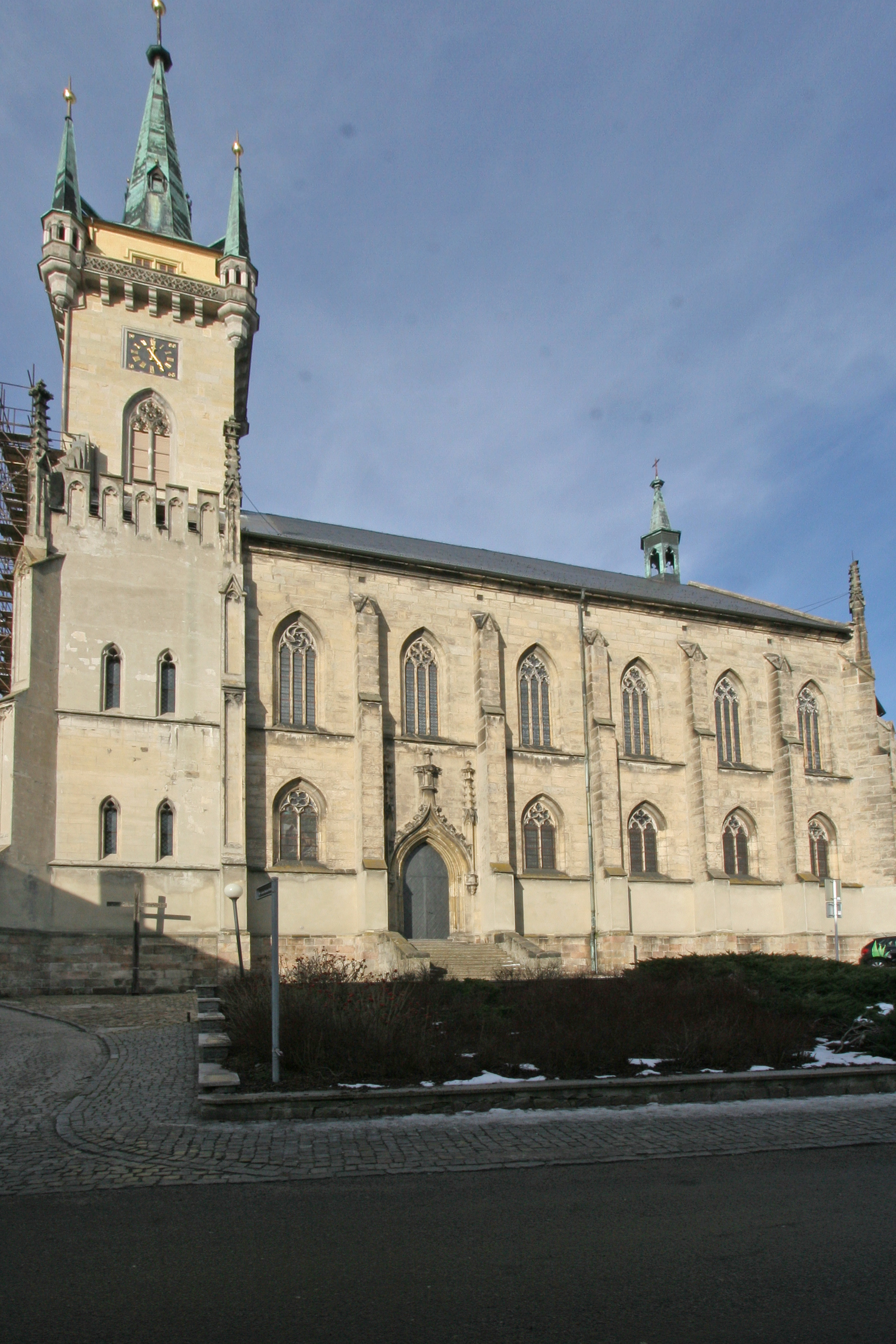 Kostel sv. Jakuba, s rodnou světničkou B. Martinů (Polička), nám. Bohuslava Martinů, Polička